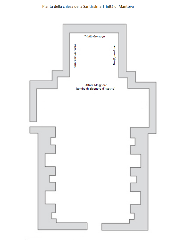 Pianta dlla chiesa della Santissima Trinità di Mantova